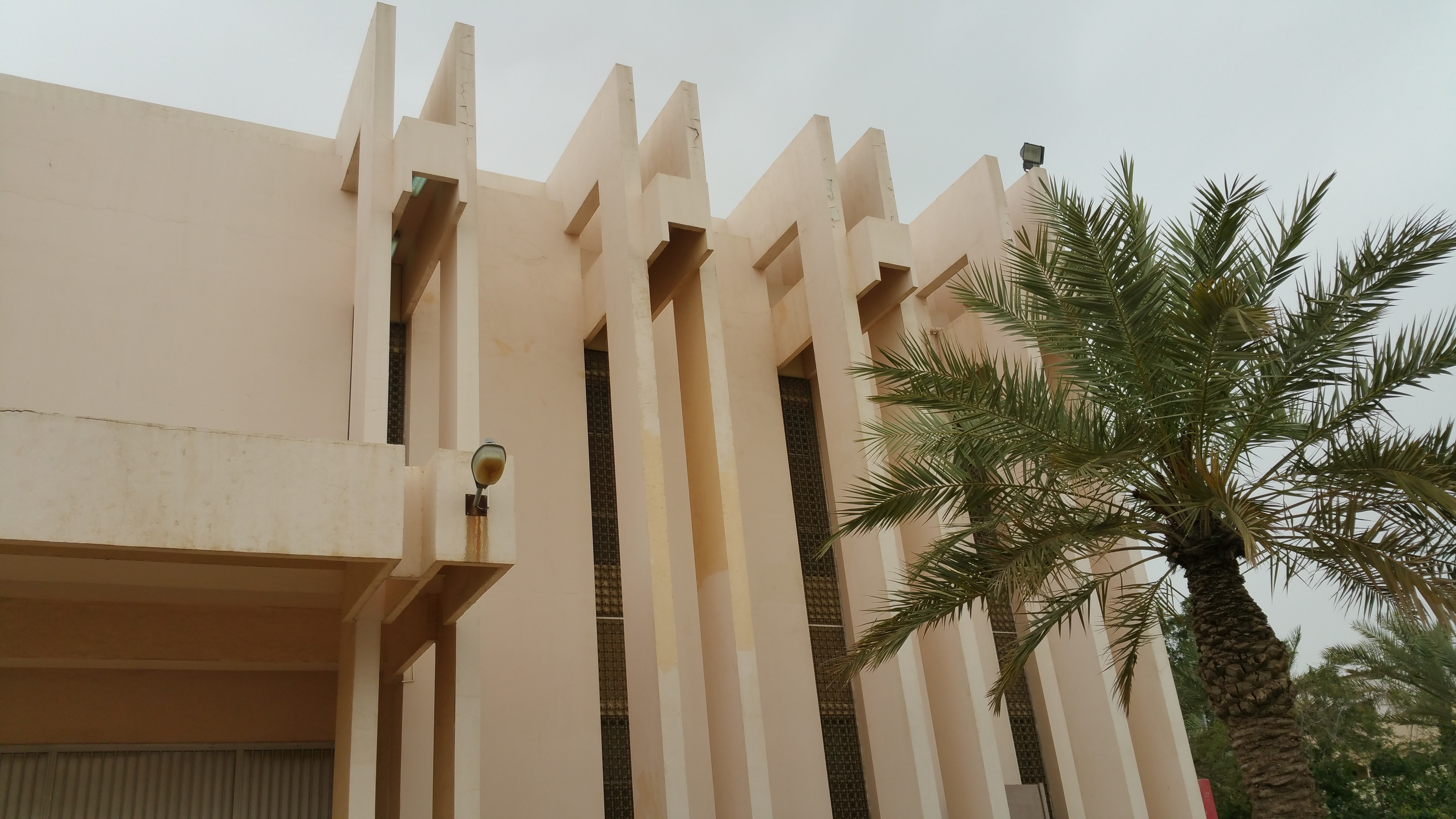 إحدى جوانب مكتبة القطيف العامة.